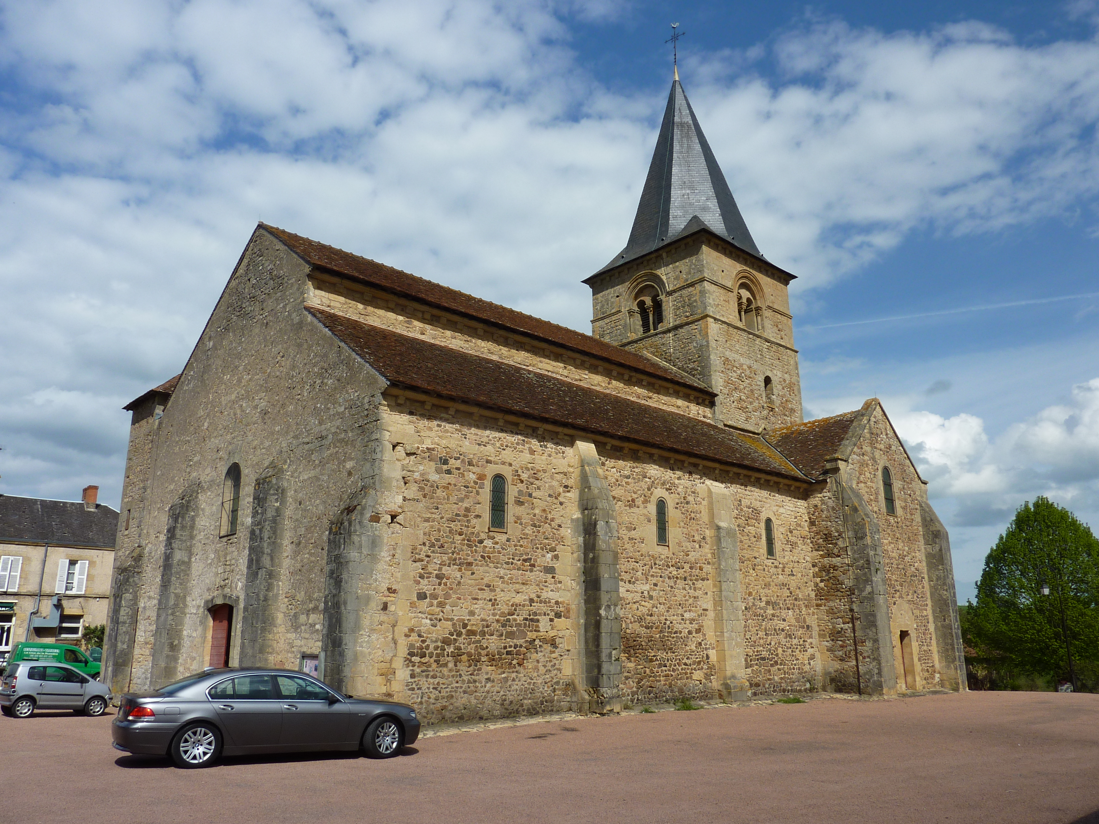 Sémelay : église paroissiale, vue extérieure